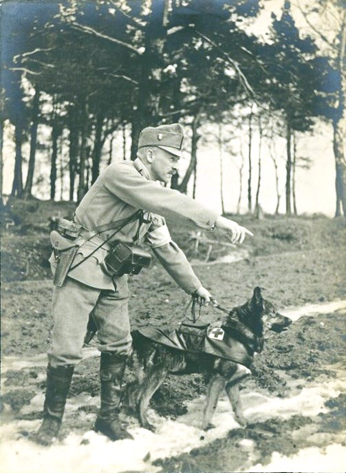 Снимка на австро-унгарски войник със санитарно куче при издирване на ранени.